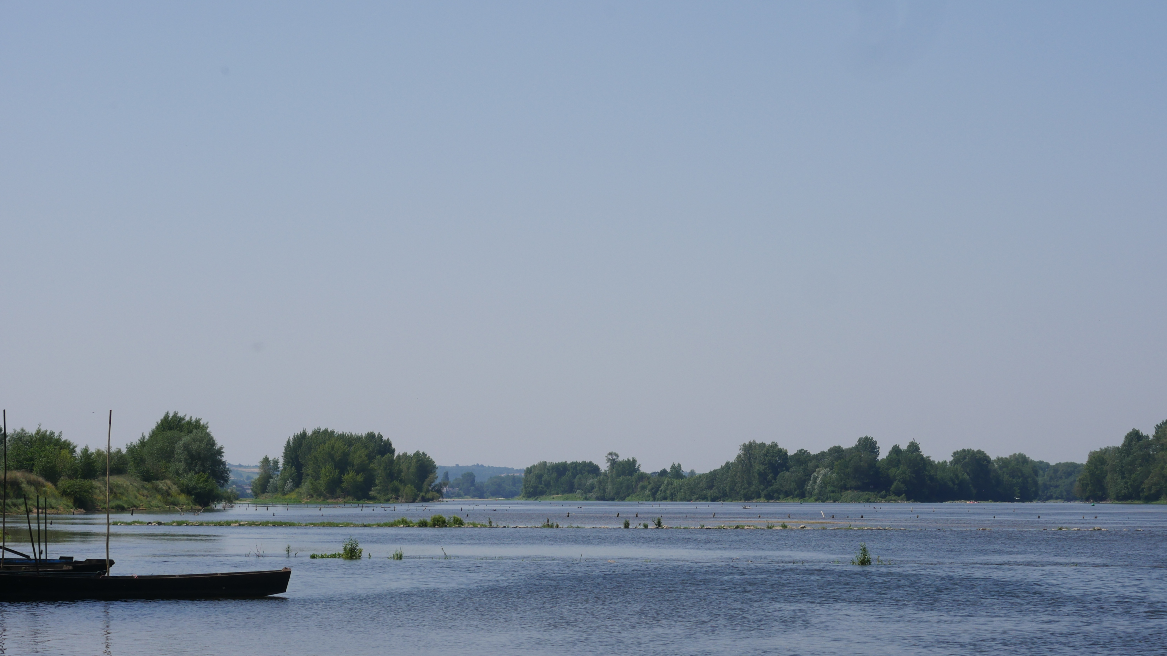 Le val de Loire à Denée (Les Jubeaux).